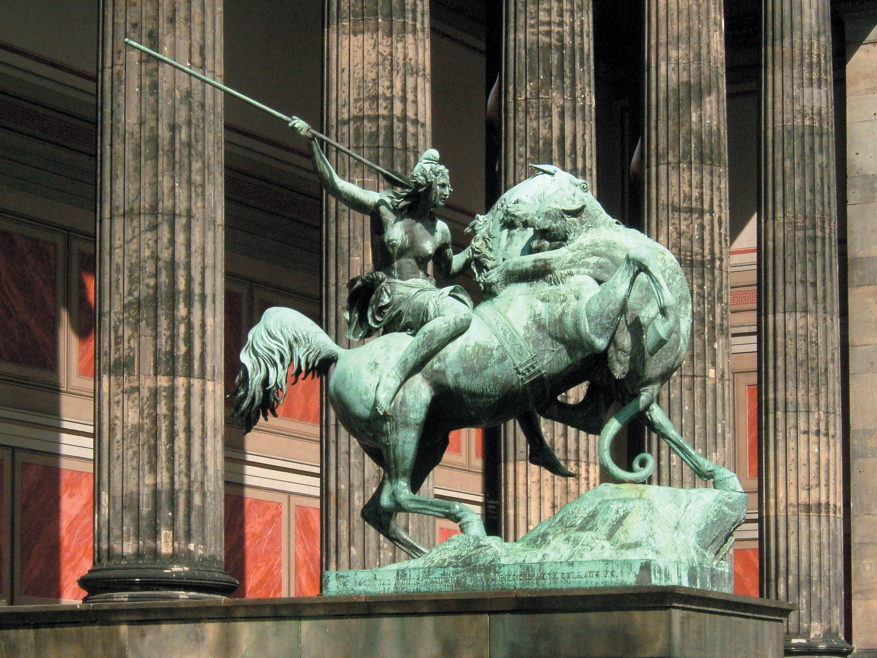 August Kiß (1837-1841) Amazone, am Alten Museum, Berlin